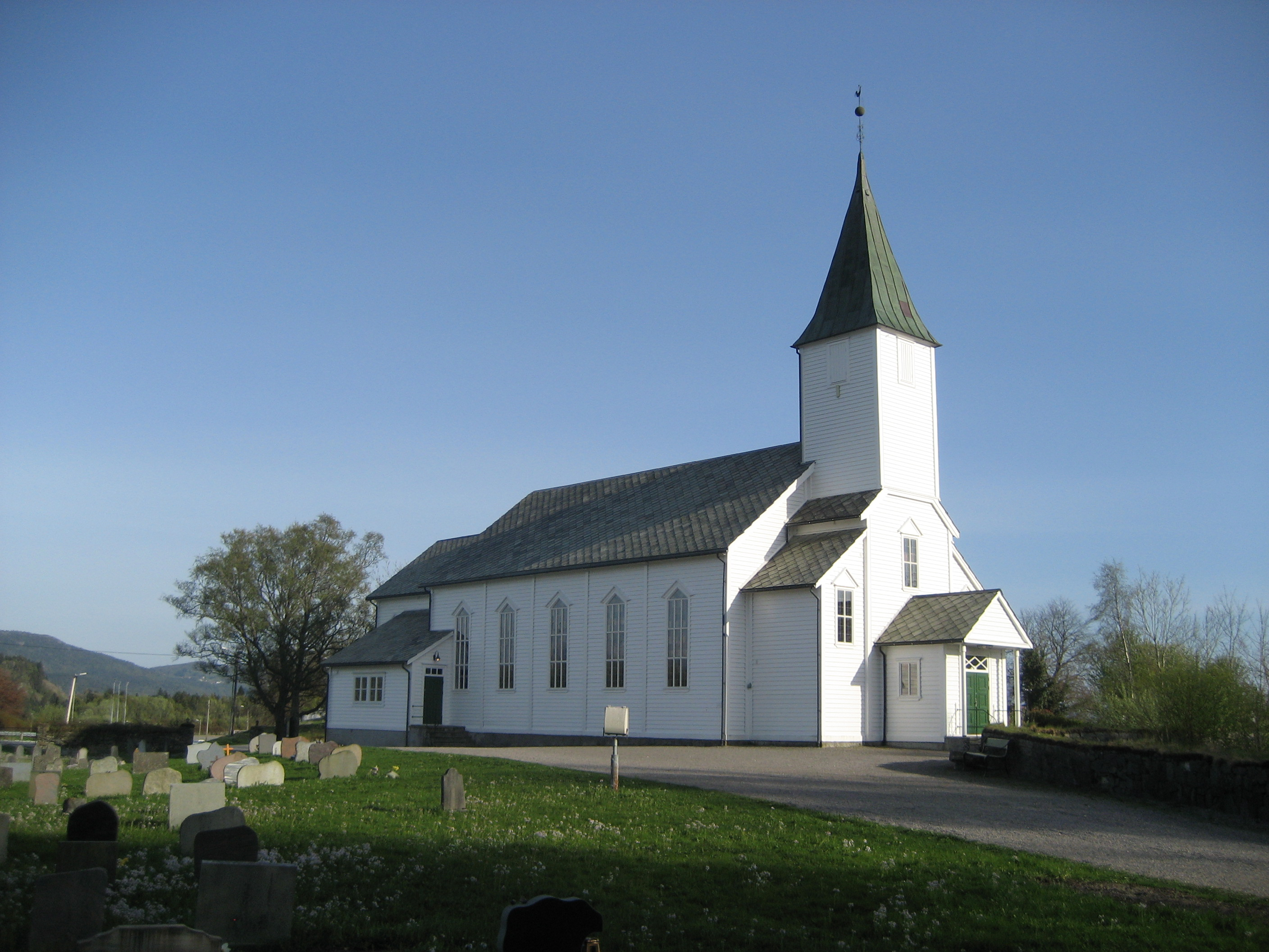 Lindås kyrkje, Alver kommune